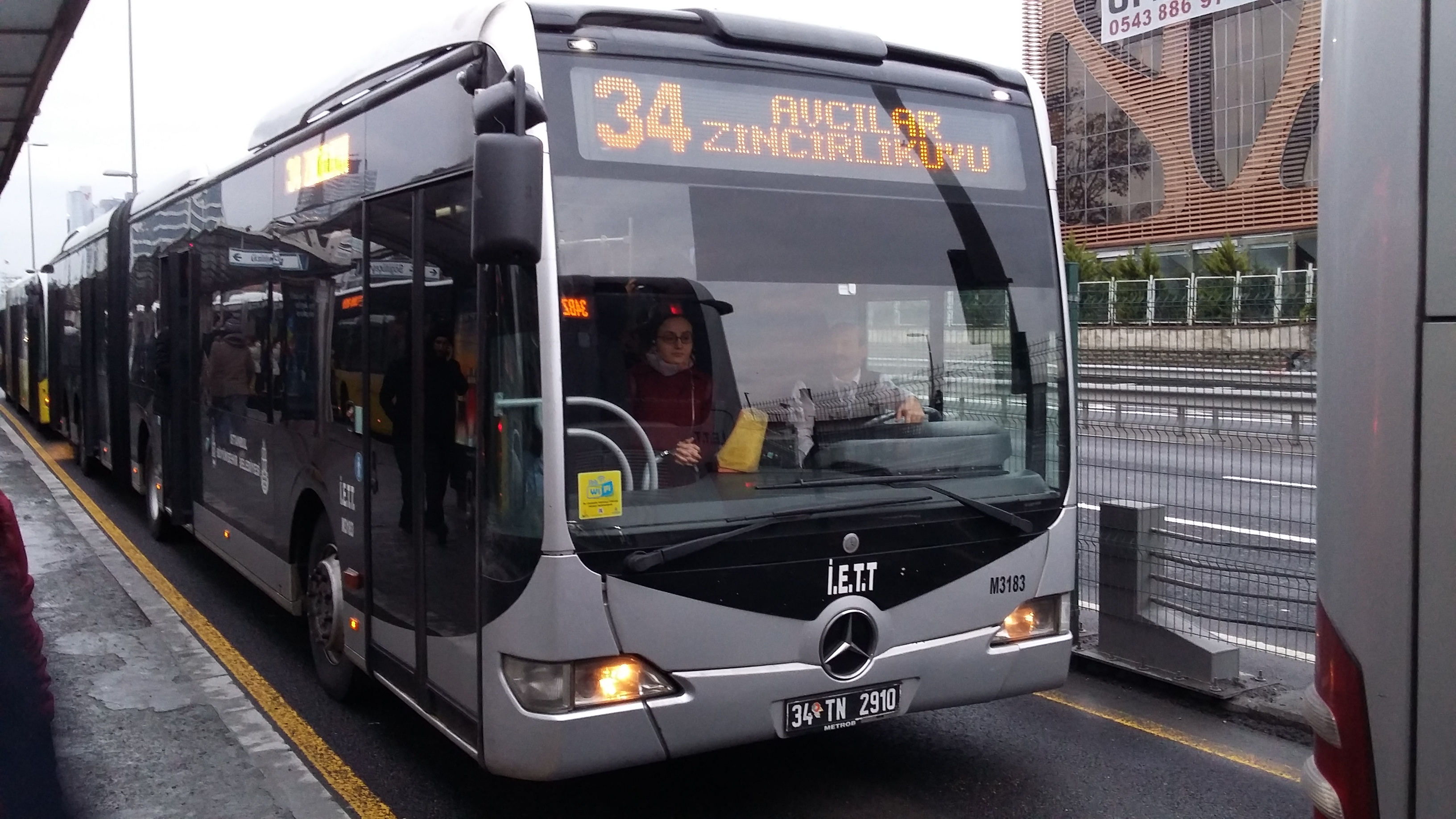 ÇAĞLAYAN